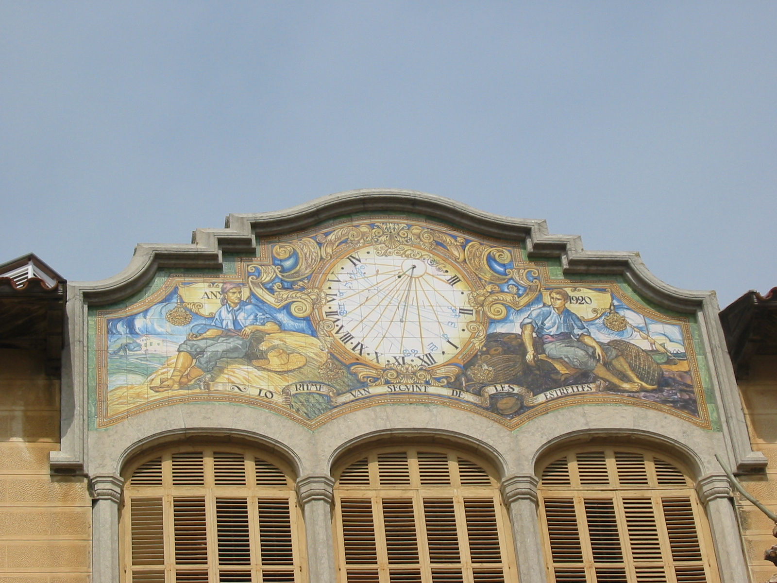 Sant Feliu de Guixols, Costa Brava, Catalonia: Casa Patxot, fresco (1920)